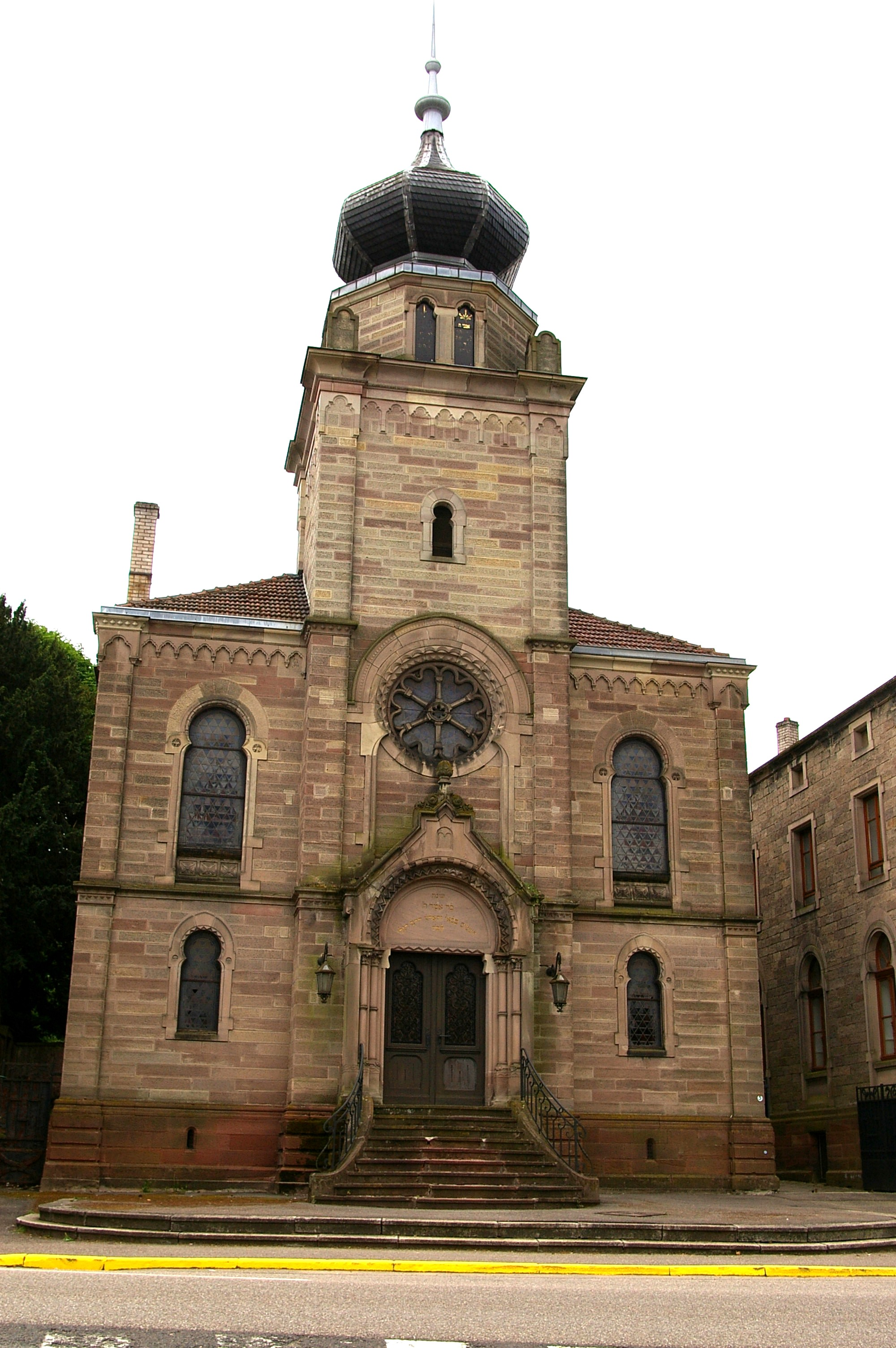 Synagogue de Saverne (Bas-Rhin)